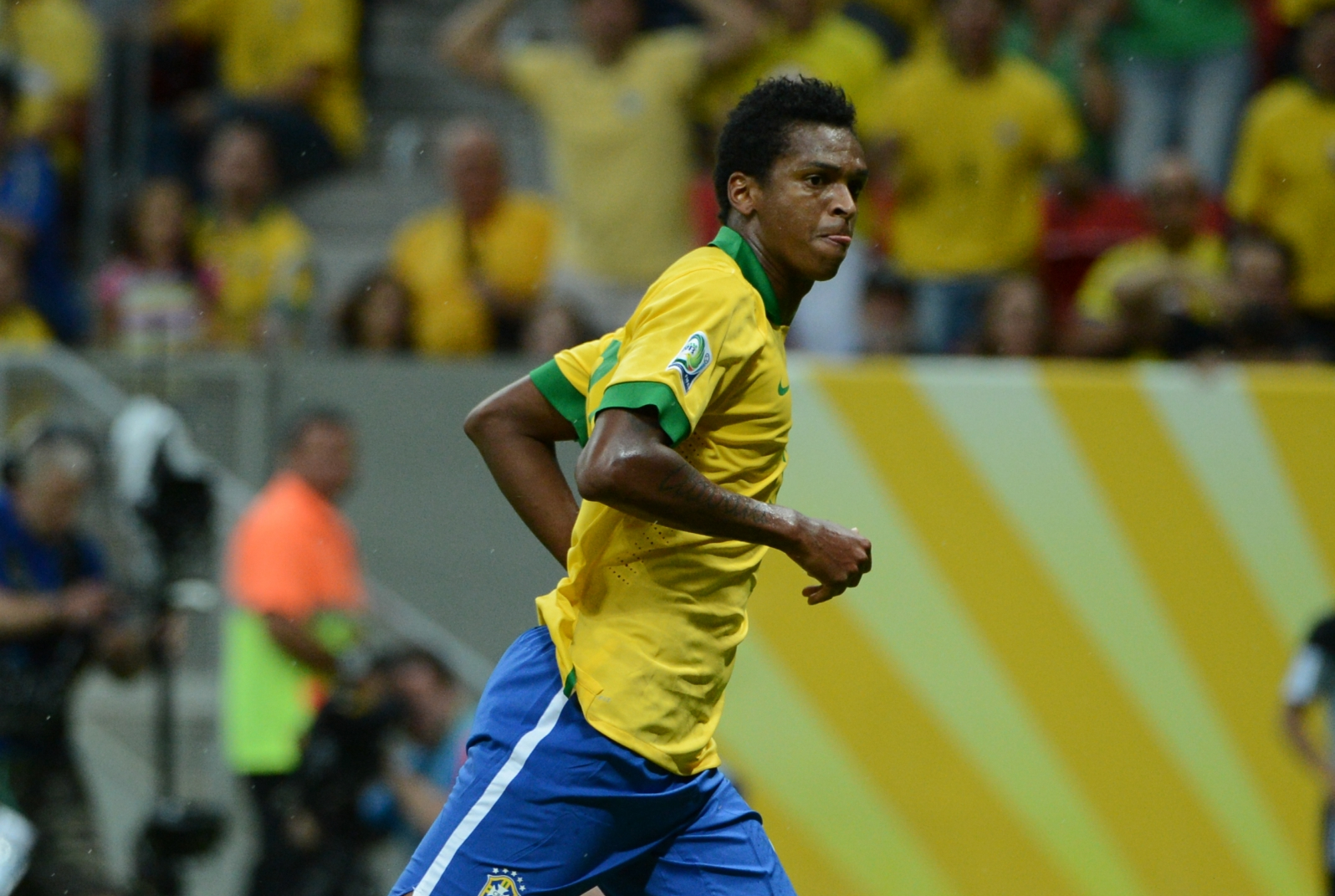 Jogador Jô, em jogo entre Brasil e Japão que abriu a Copa das Confederações de 2013